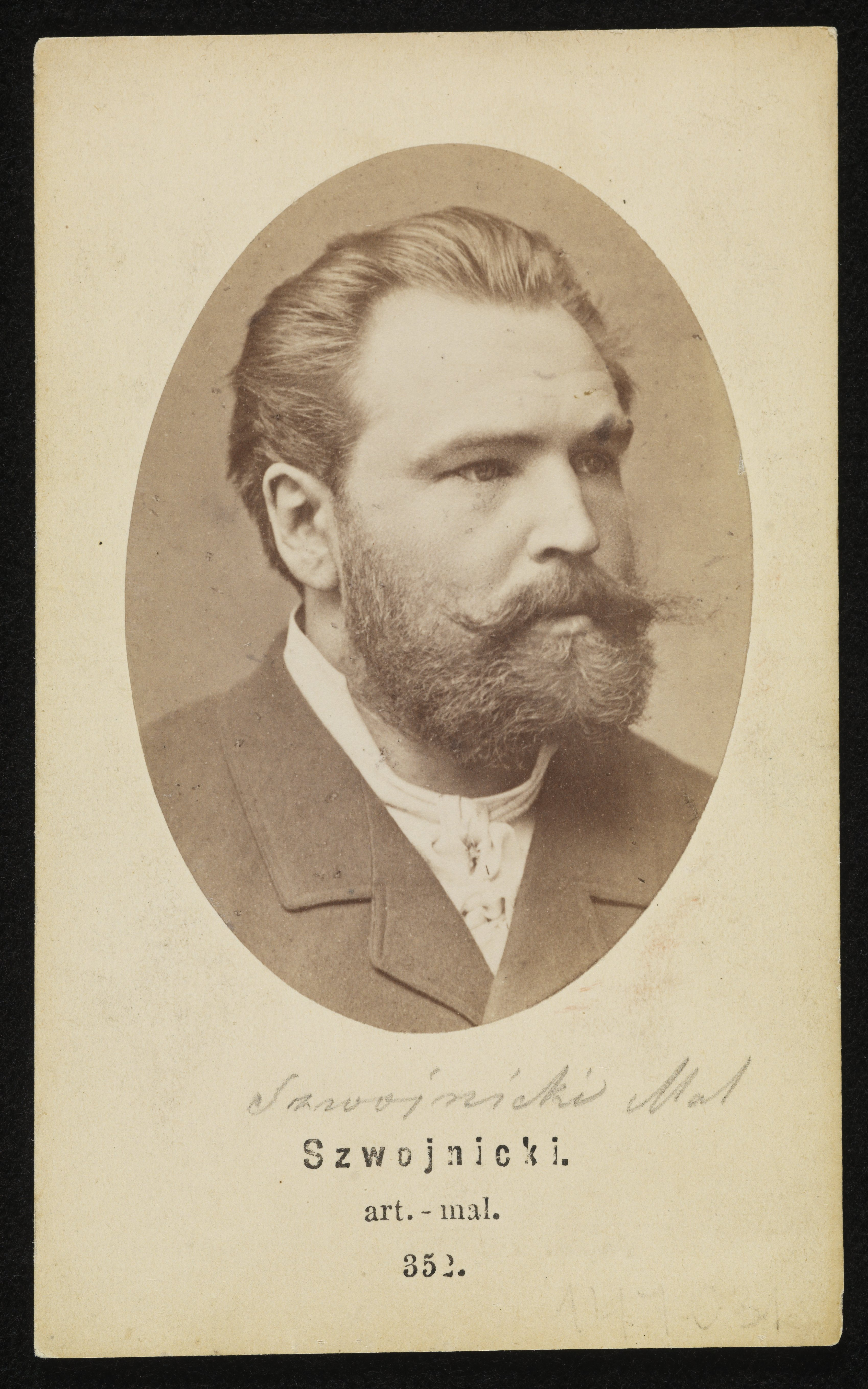 Roman Szwojnicki, 1882 r.